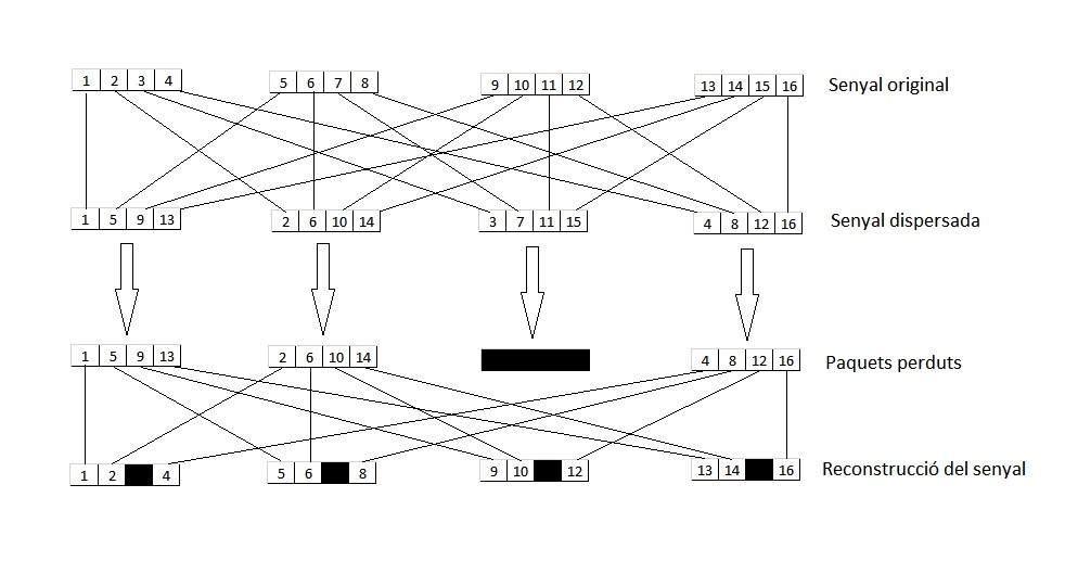 efectes del dispersor (interleaver)